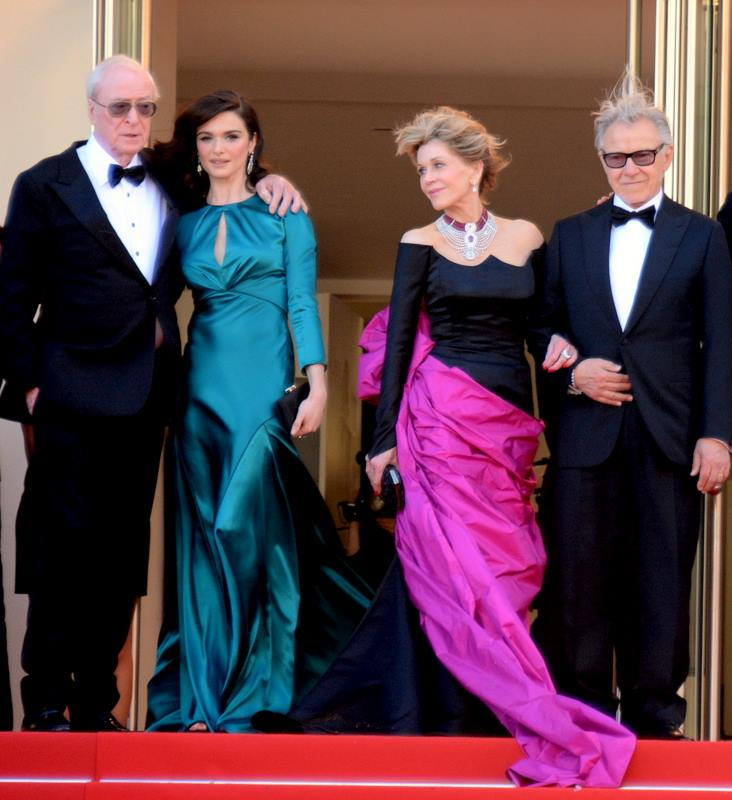 Michael Caine; Rachel Weisz, Jane Fonda et Harvey Keitel lors de la présentation de "Youth" au festival de Cannes